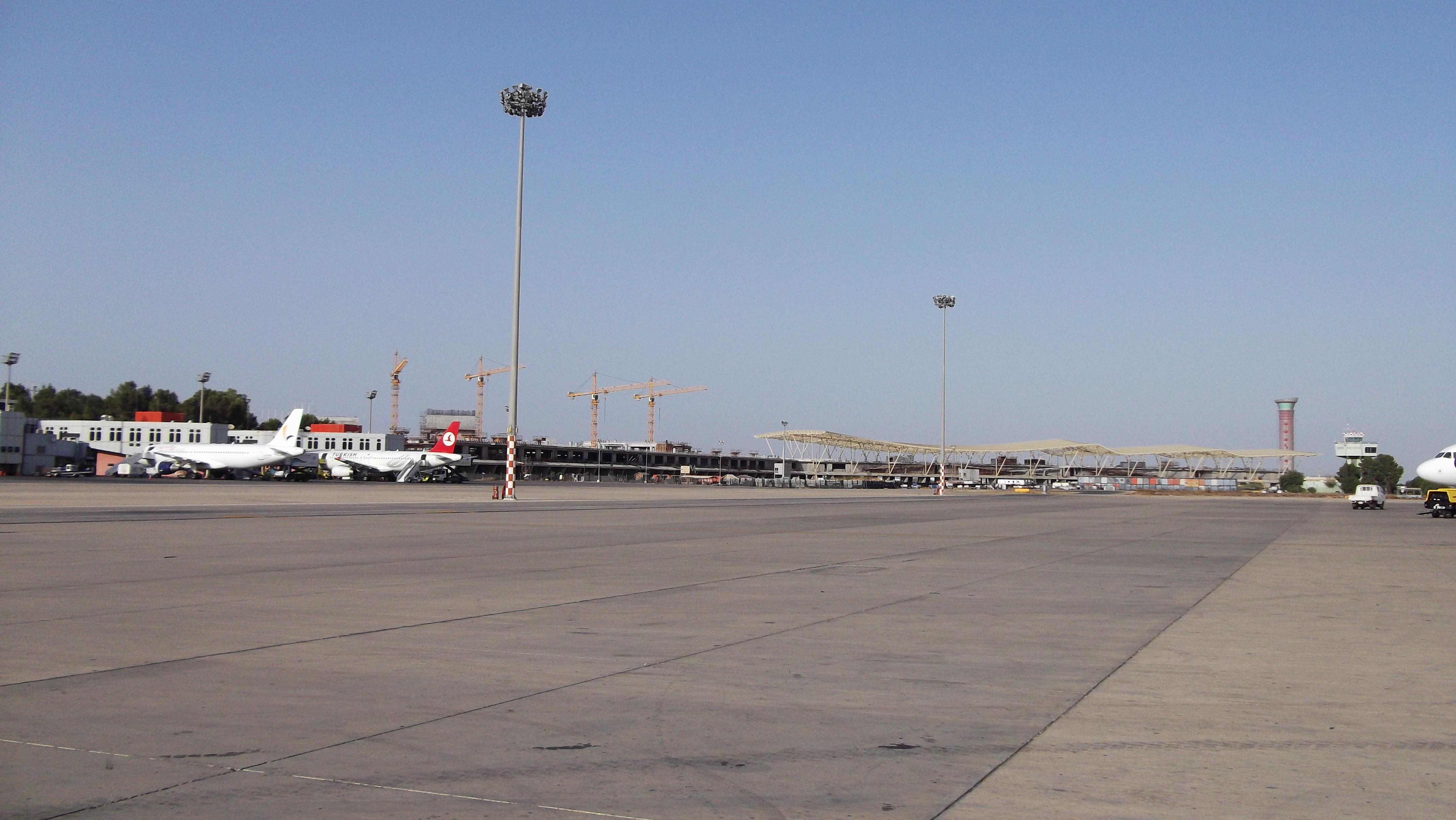 مدرج مطار طرابلس الدولي وجزء من صالة الركاب الجديدة التي يجري تشييدها